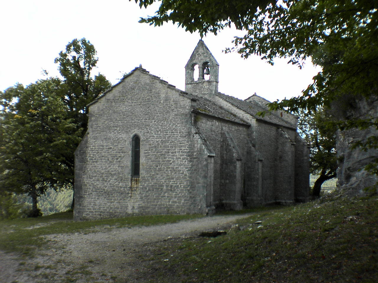 Vue de la chapelle de Saint Romain de Condat située sur la commune de Pratz dans le Haut-Jura.(39) Cette chapelle surplombe le village de Vaux les St Claude. C'est un lieu magnifique pour se ressourcer et méditer.